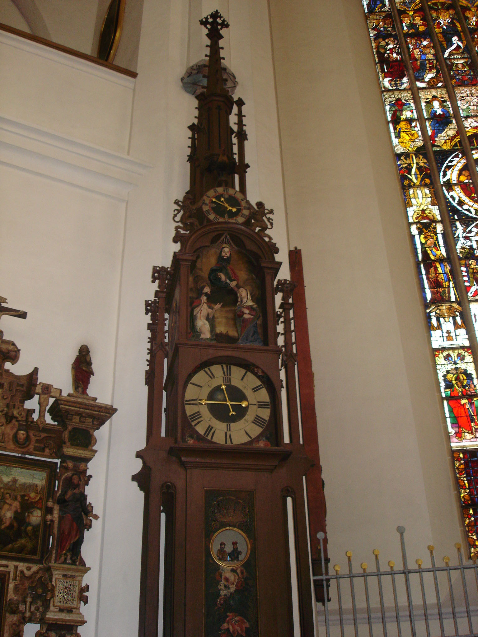 Automatenuhr in der Frauenkirche München, angeblich ältester funktionsfähiger Bildautomat, Bildwerke um 1500, Erasmus Grasser zugeschrieben